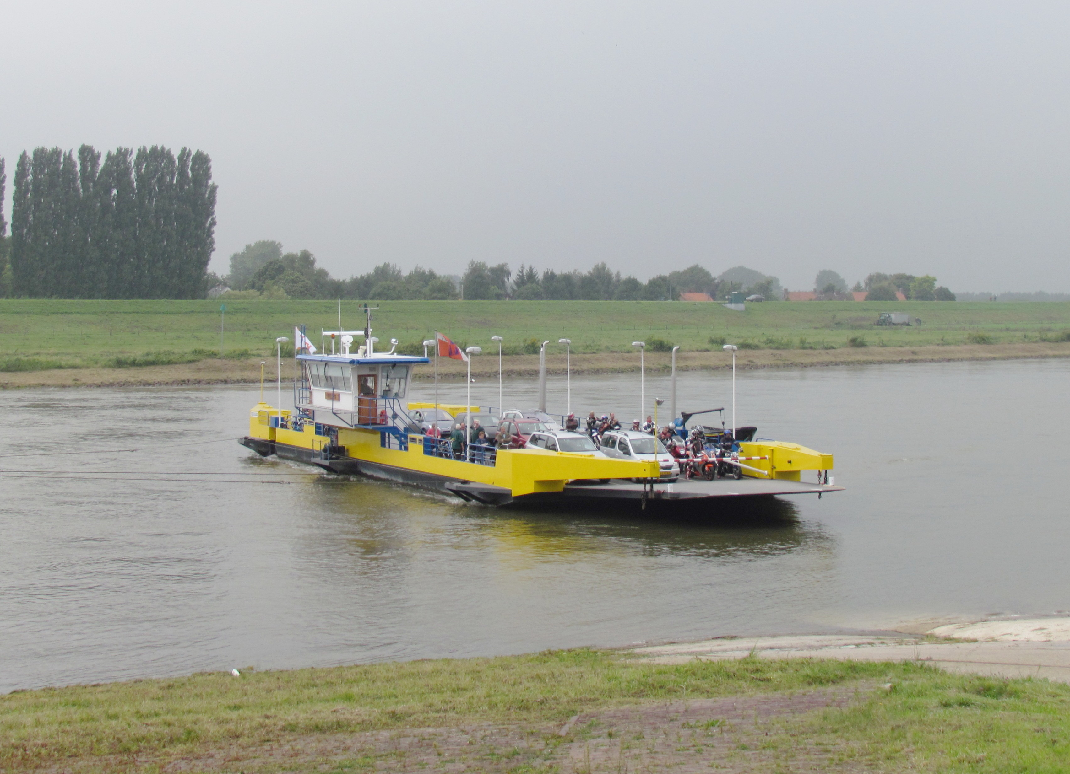 Veer 'Willem' (2010) van Doornenburg naar Pannerden over het Pannerdensch Kanaal (varend van Sterreschans naar Veerdam Pannerden)